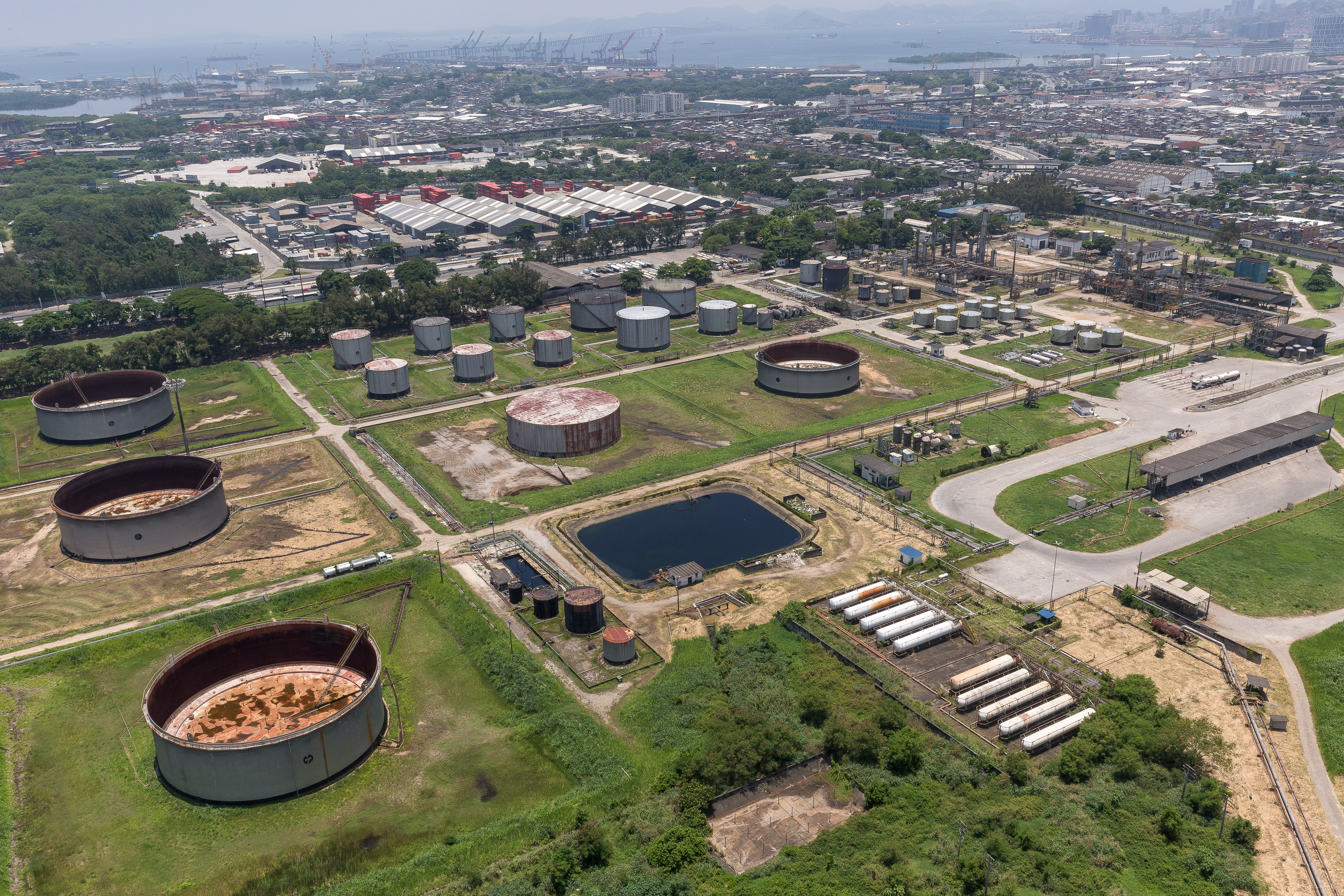 Vista aérea da Refinaria de Manguinhos, localizada na cidade do Rio de Janeiro.